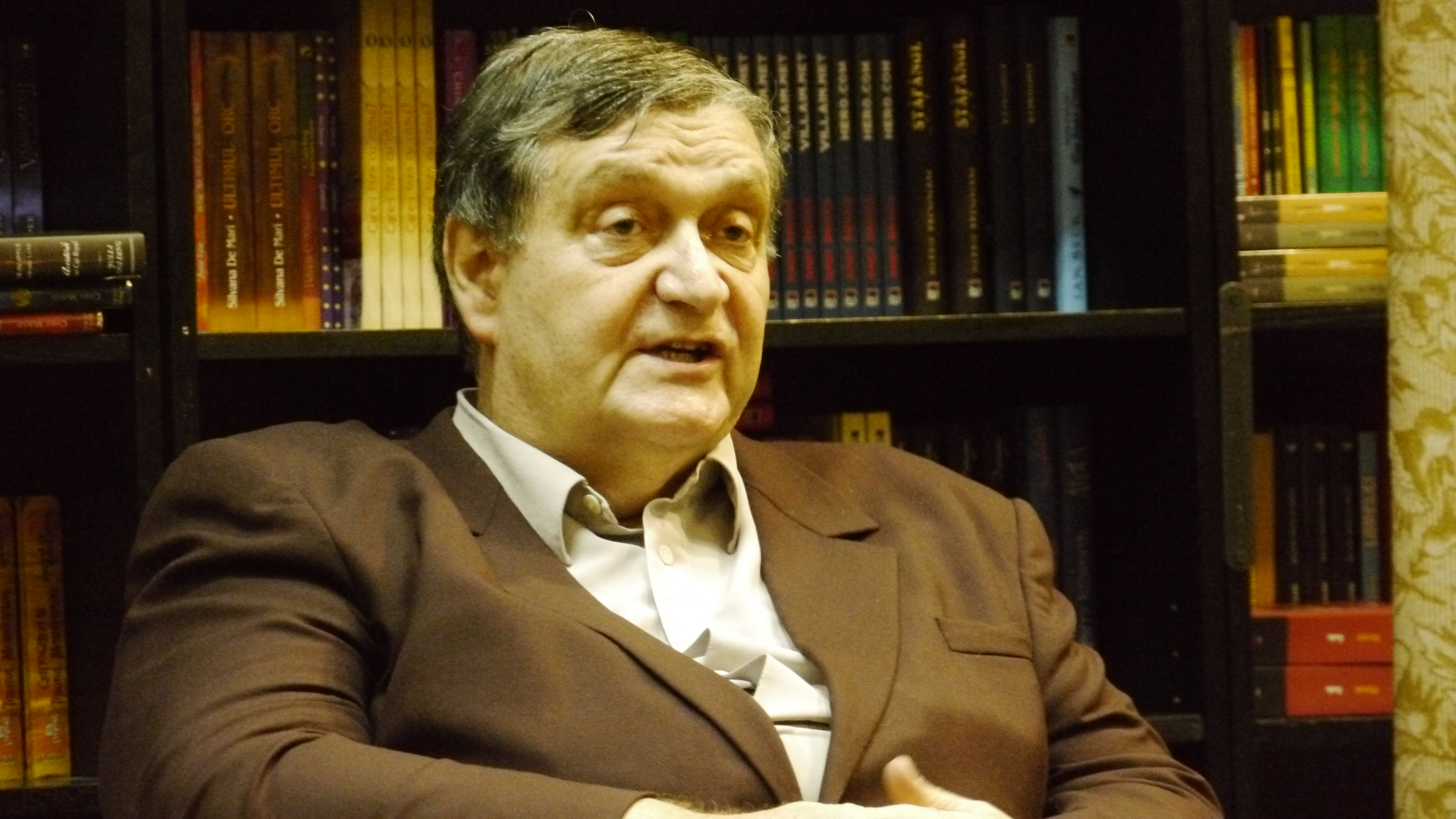 Alex Ştefănescu. Sala Dalles, Ora 19:00, 9 martie 2011, lansare Lyrica magna (Eseu despre poezia lui Nichita Stănescu), Editura Curtea Veche, 2010 de Daniel Cristea-Enache.